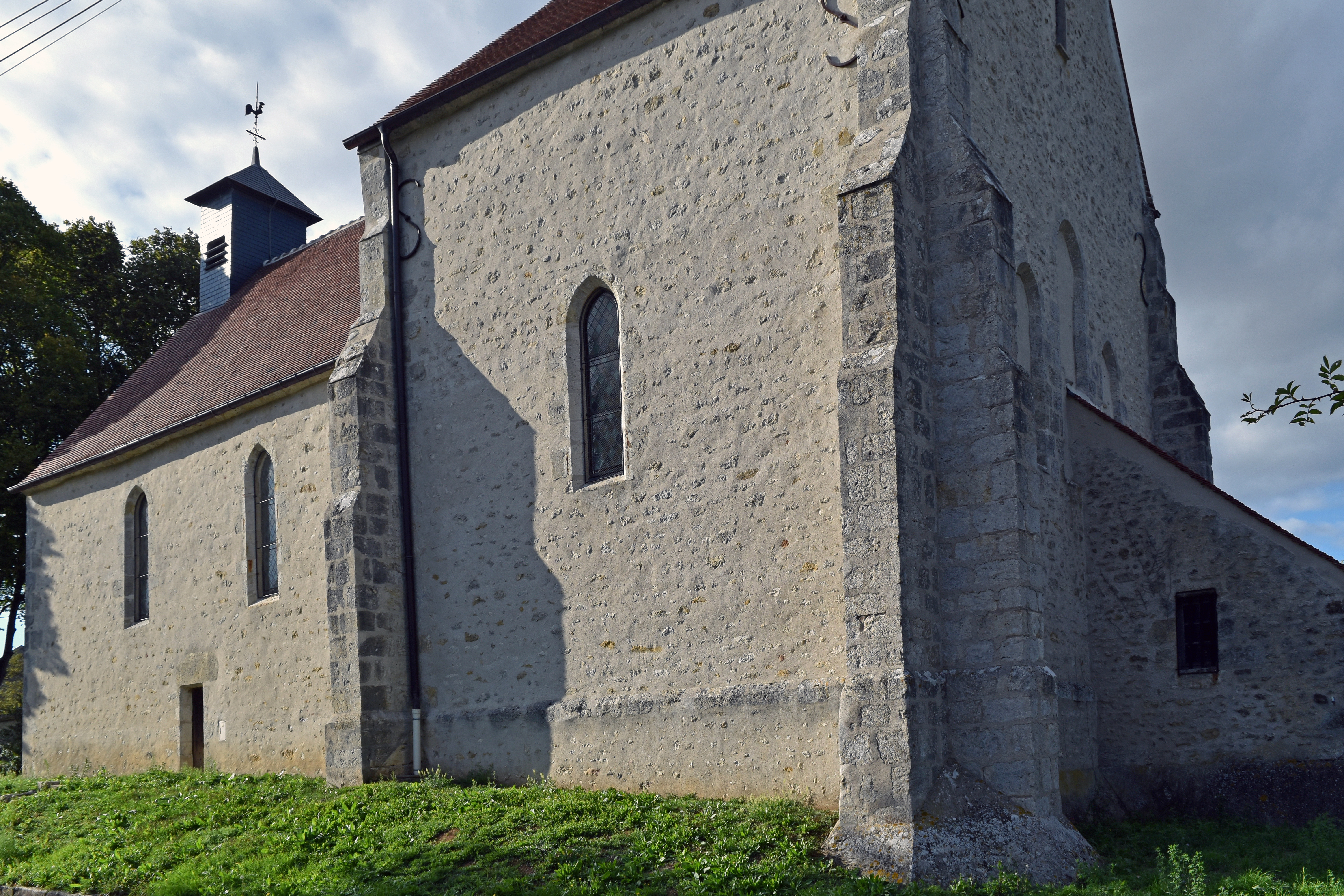 Eglise paroissiale Saint-Blaise ou Saint-Fiacre à Dimancheville, Loiret, France .